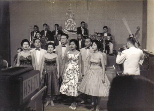 วงดนตรีสุนทราภรณ์ยุคกลาง